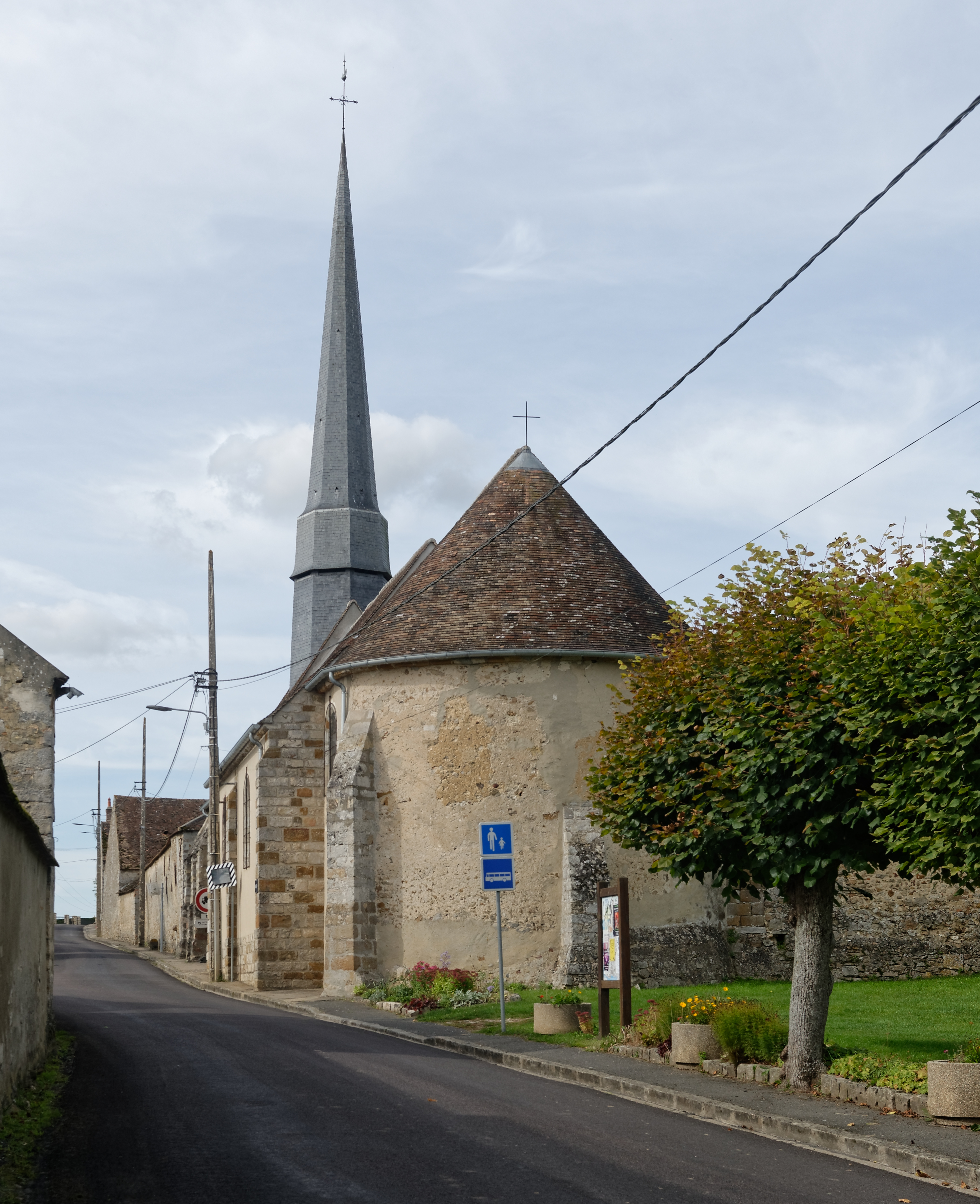 Abside de l'église Sainte-Geneviève vue depuis la grande rue à Diant en Seine-et-Marne, dans la région Île-de-France.